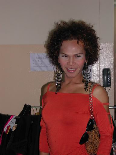 Platoo (spreek uit Plaah-toe of Praah-toe, Transseksueel). Lid van de Thaise Comedygroep Doo Dokraedone. Opname gemaakt bij opnamen voor de afleveringen uit te zenden tussen kerst en oud en nieuw 2005 van het programma ChuanChym cafe.